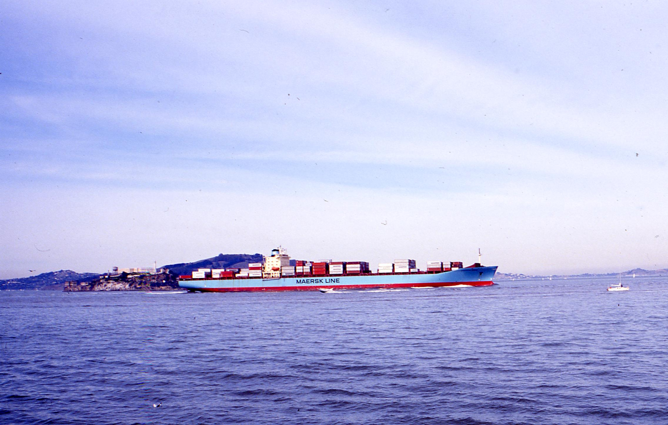 Containerfrachter vor der Gefängnisinsel Alcatraz auf Fahrt durch die San Francisco Bay nach Oakland Harbour.